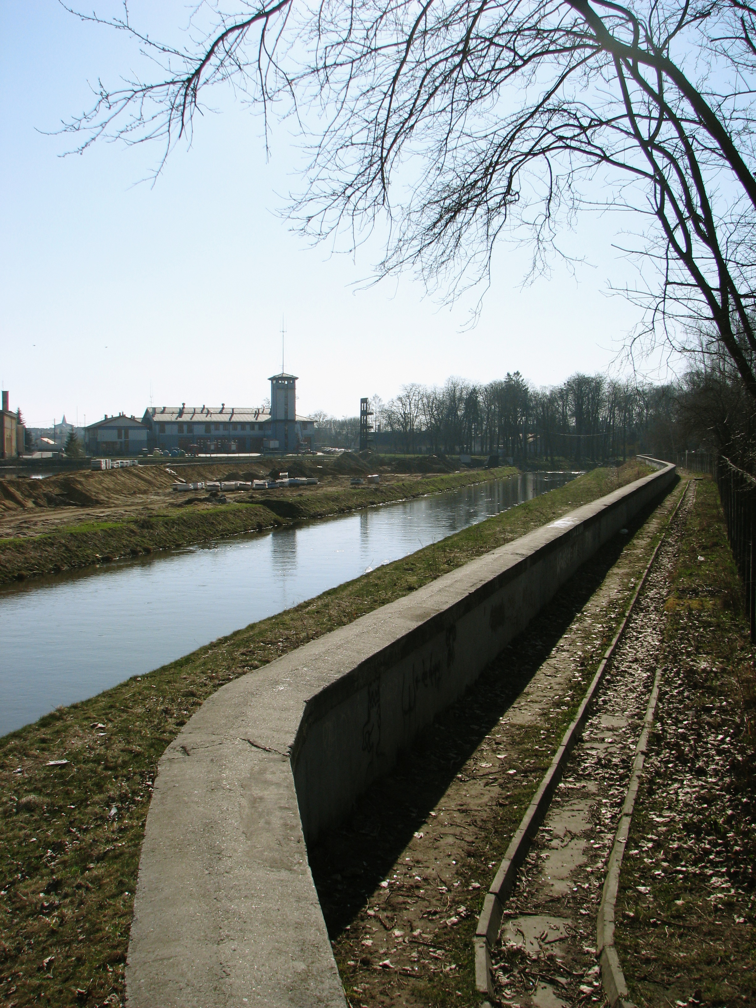 Uregulowane koryto rzeki Czarnej w obrębie Staszowa, Polska.